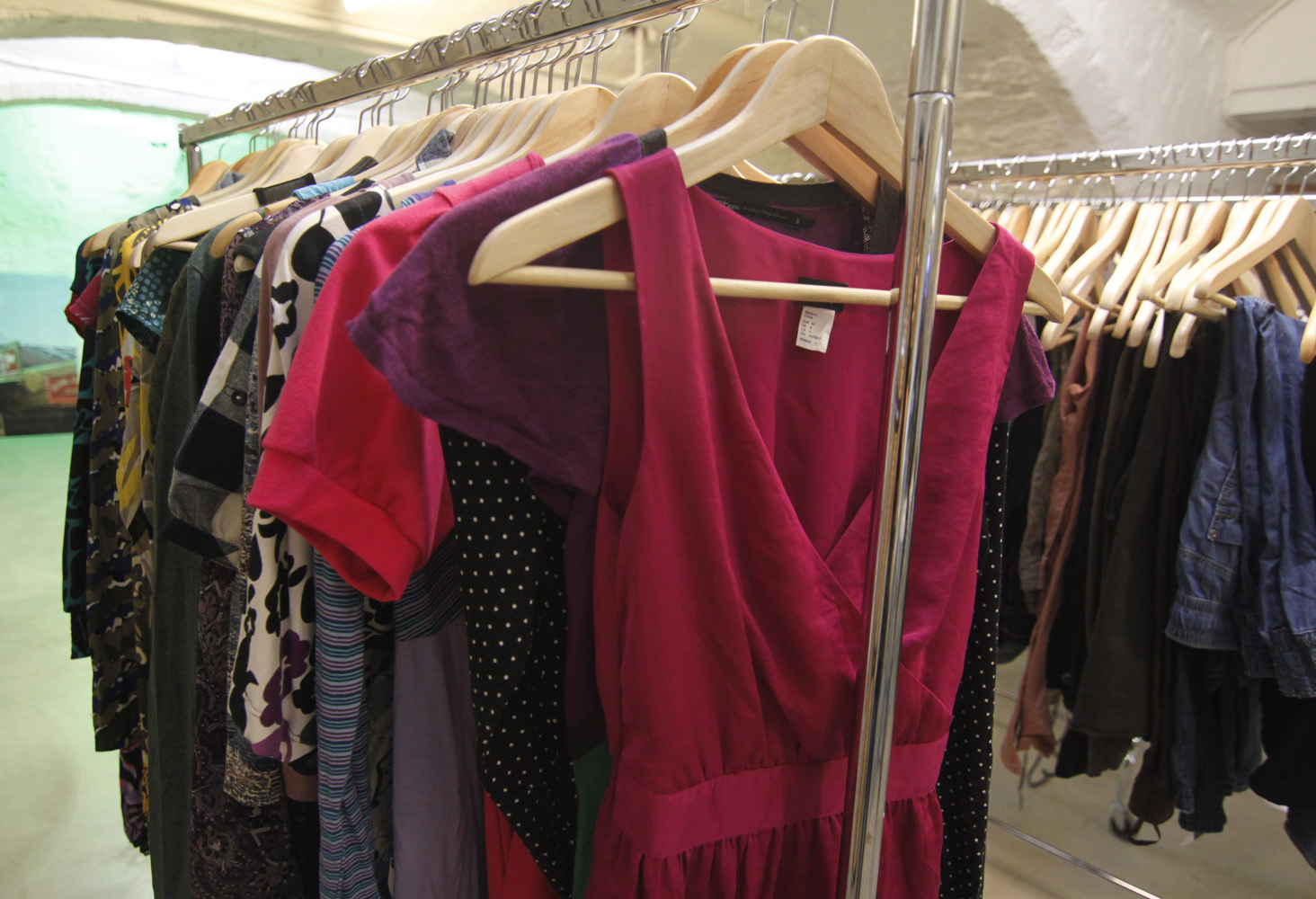 Een kledingrek waaraan kleding is gehangen die bedoeld is om te ruilen.